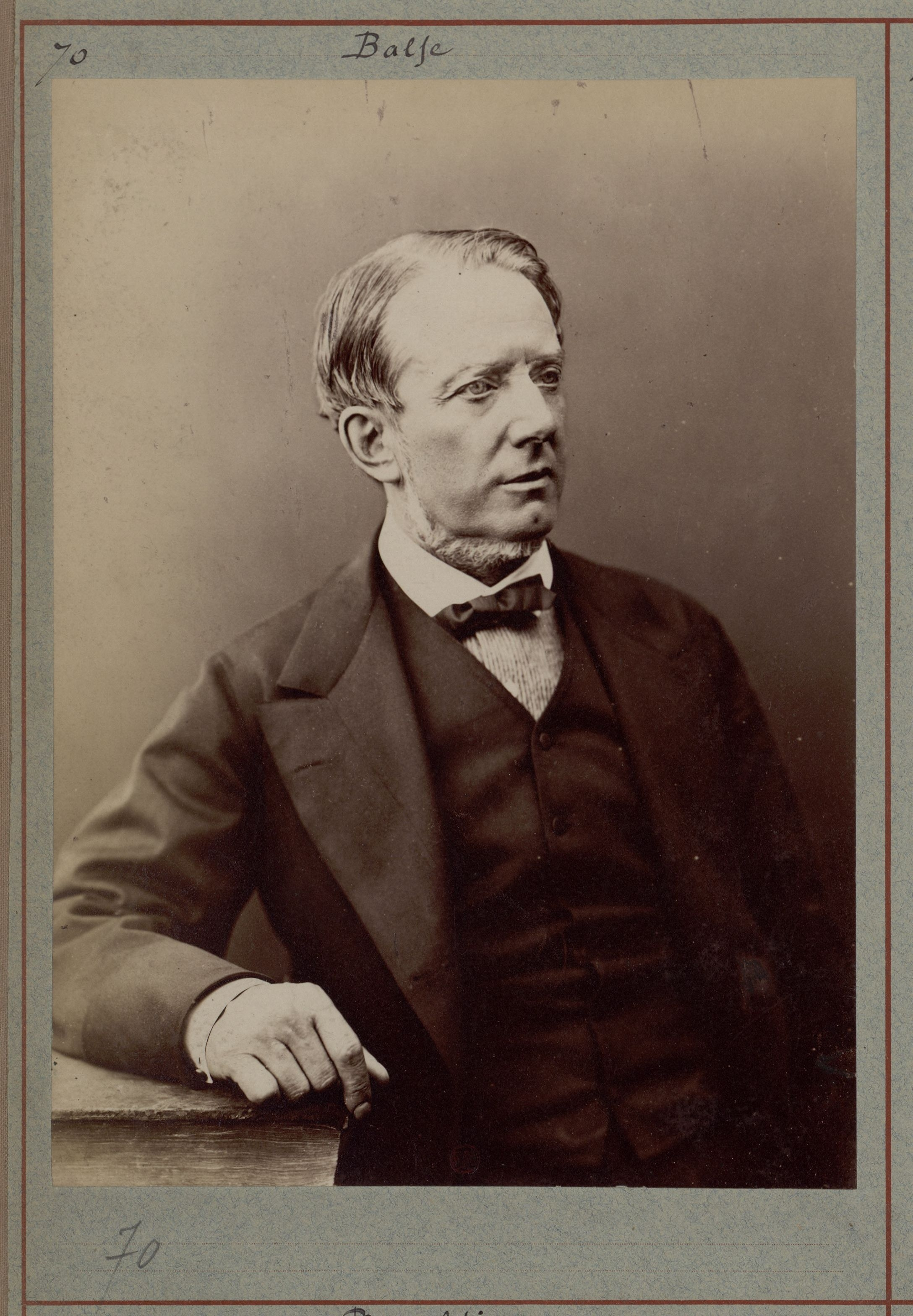 Michael William Balfe